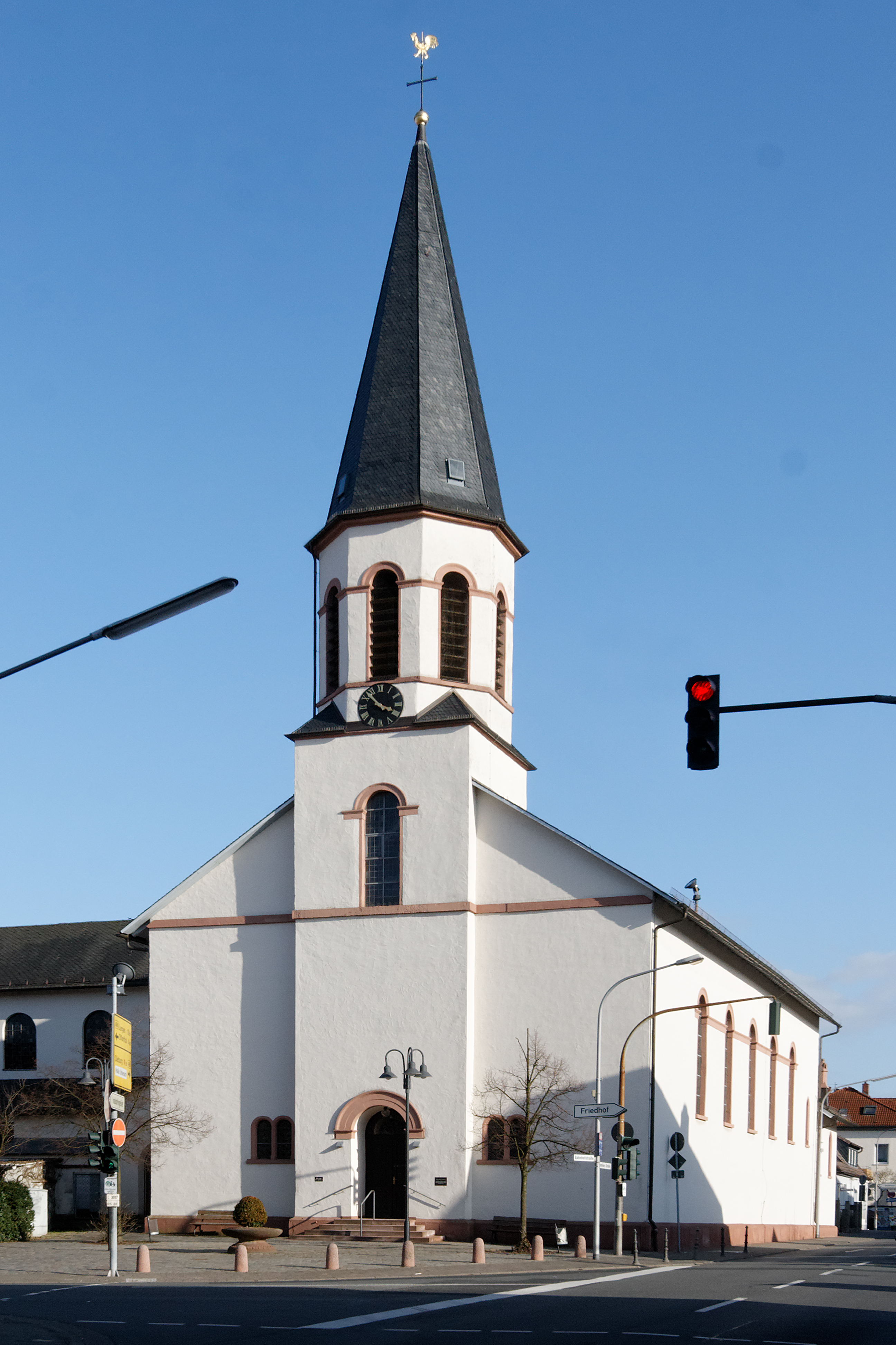 Katholische Pfarrkirche St. Gallus in Urberach, einem Stadtteil von Rödermark. Klassizistische Saalkirche, erbaut 1821–23, umgebaut 1878/79, erweitert 1955/56.